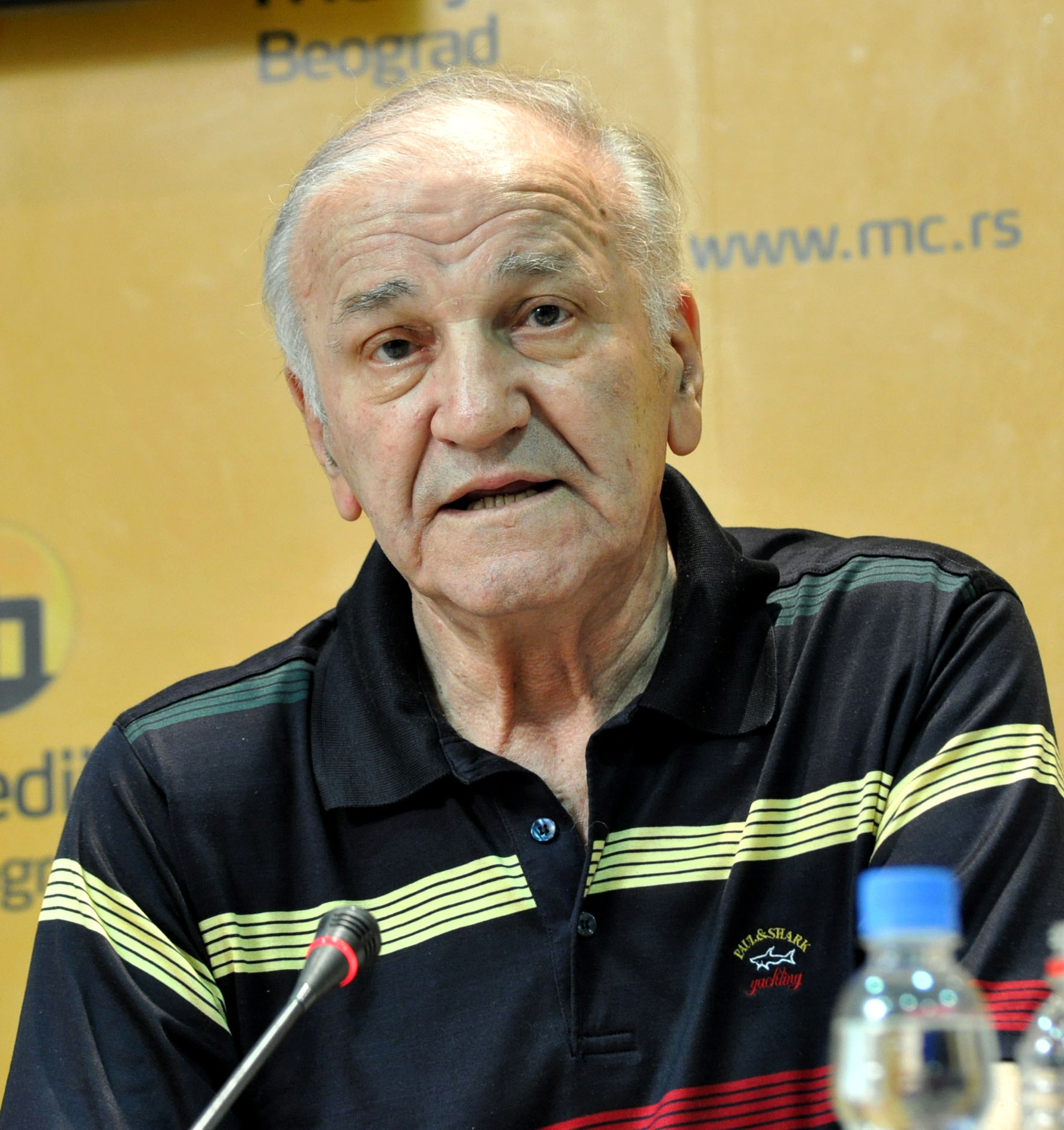 Велимир Бата Живојиновић, српски глумац Извор: Медија центар Београд Дозволе за објављивање